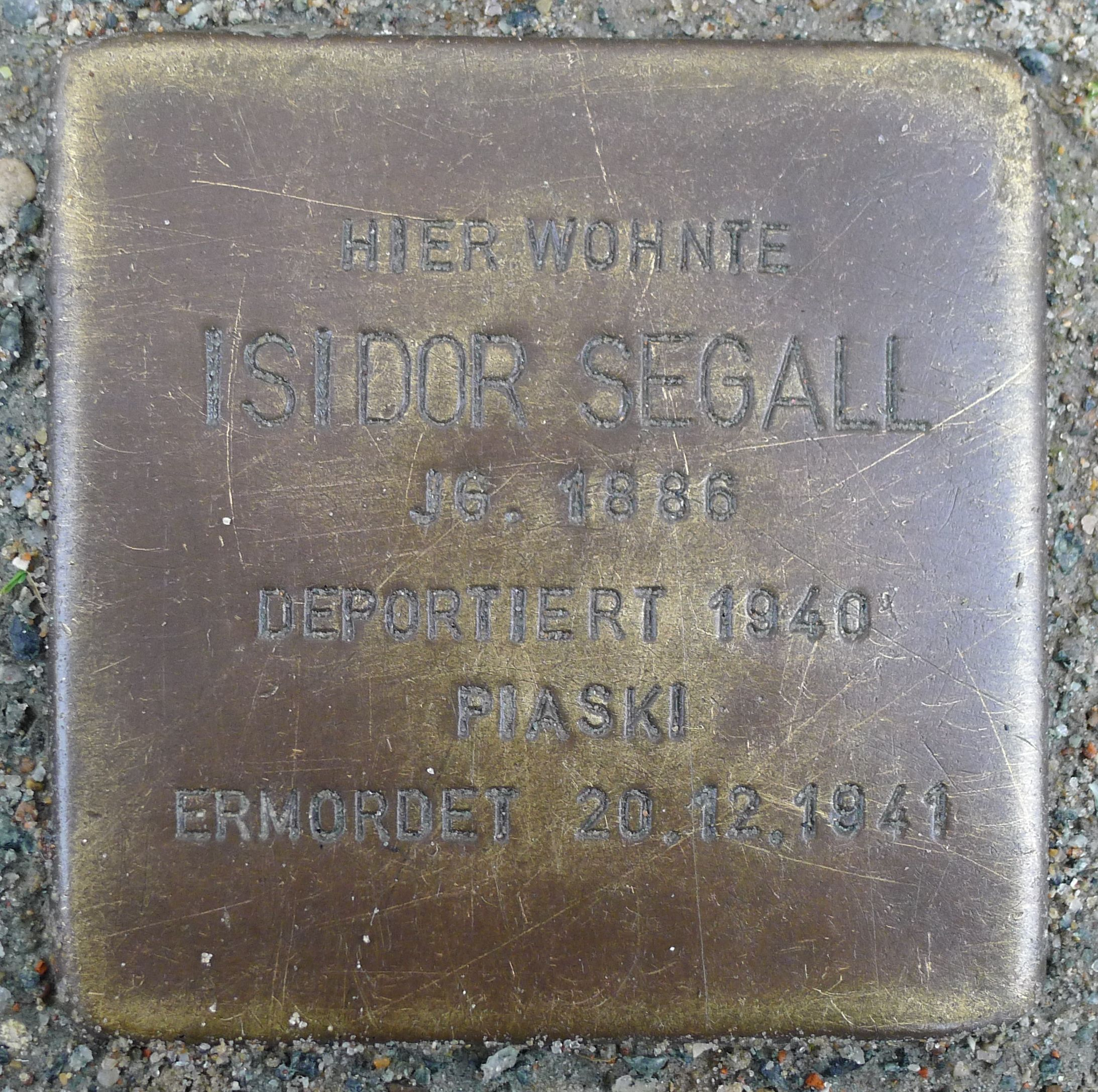 Stolperstein für Isidor Segall, Stralsund, Papenstraße 6